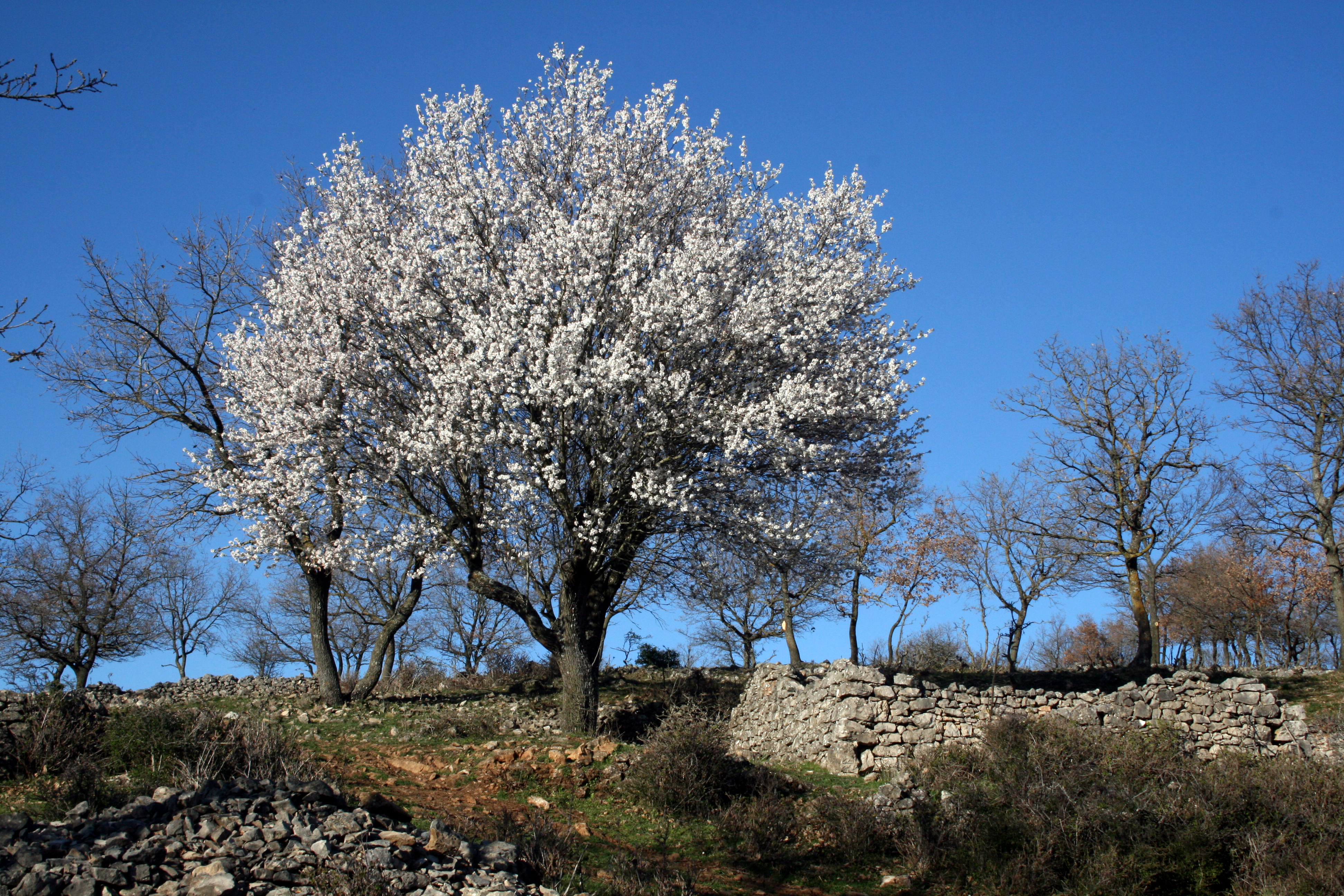 Gargano - Mandorlo in fiore